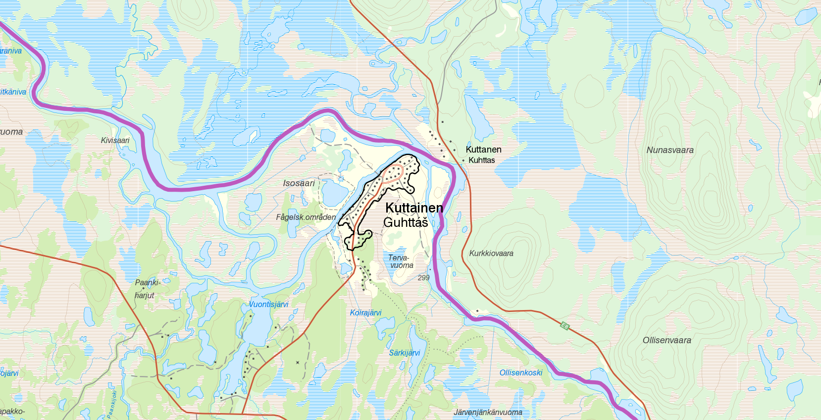 Tätorten Kuttainen med gränserna från Statistiska centralbyråns tätortsavgränsning 2015. Bakgrundskarta från Lantmäteriet, skala 1:30 236.